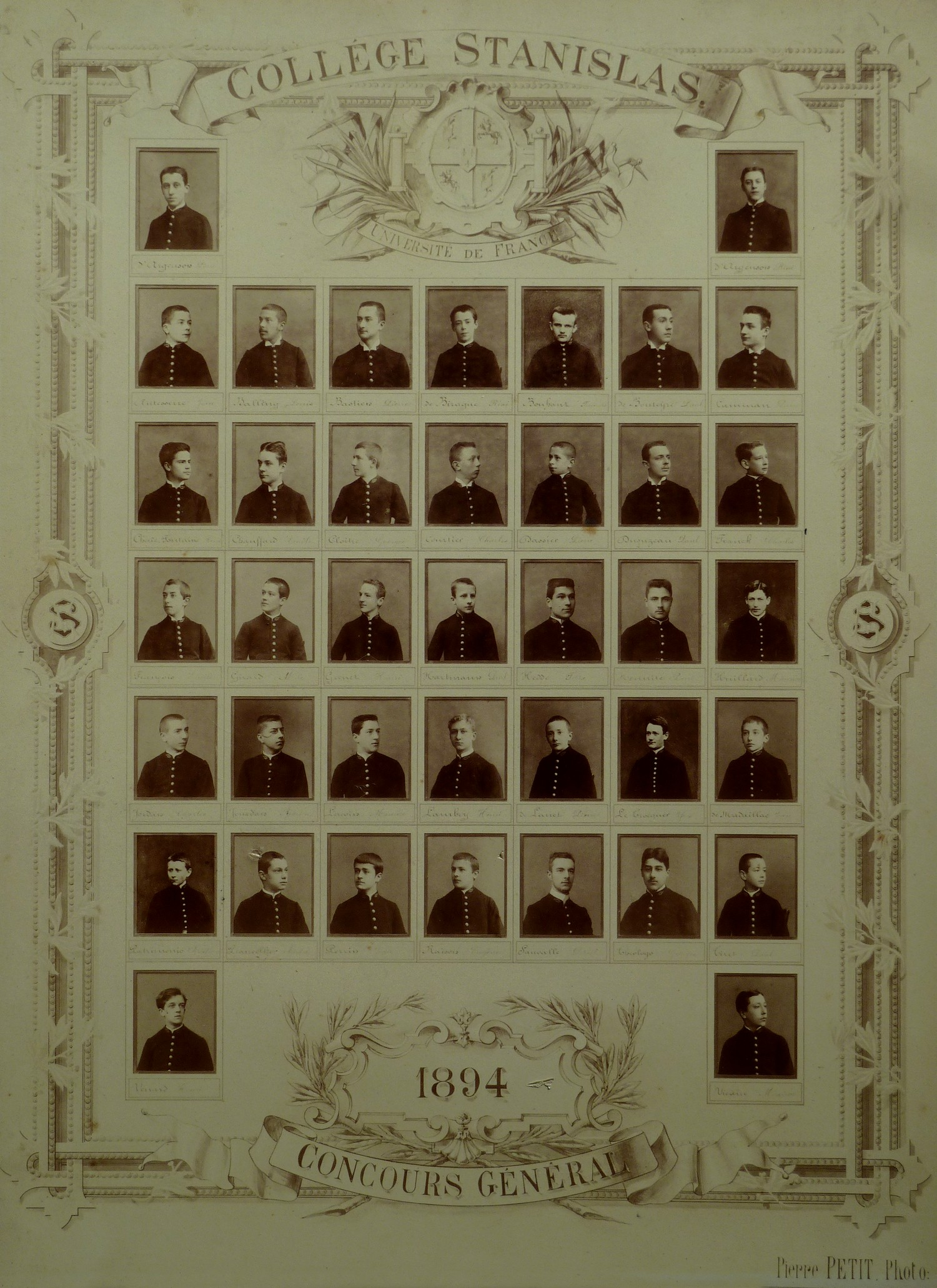 Concours Général au collège Stanislas (Paris, 6e arrond.) en 1894. Photographie de Pierre Petit, 39 x 29 cm. Collection particulière.